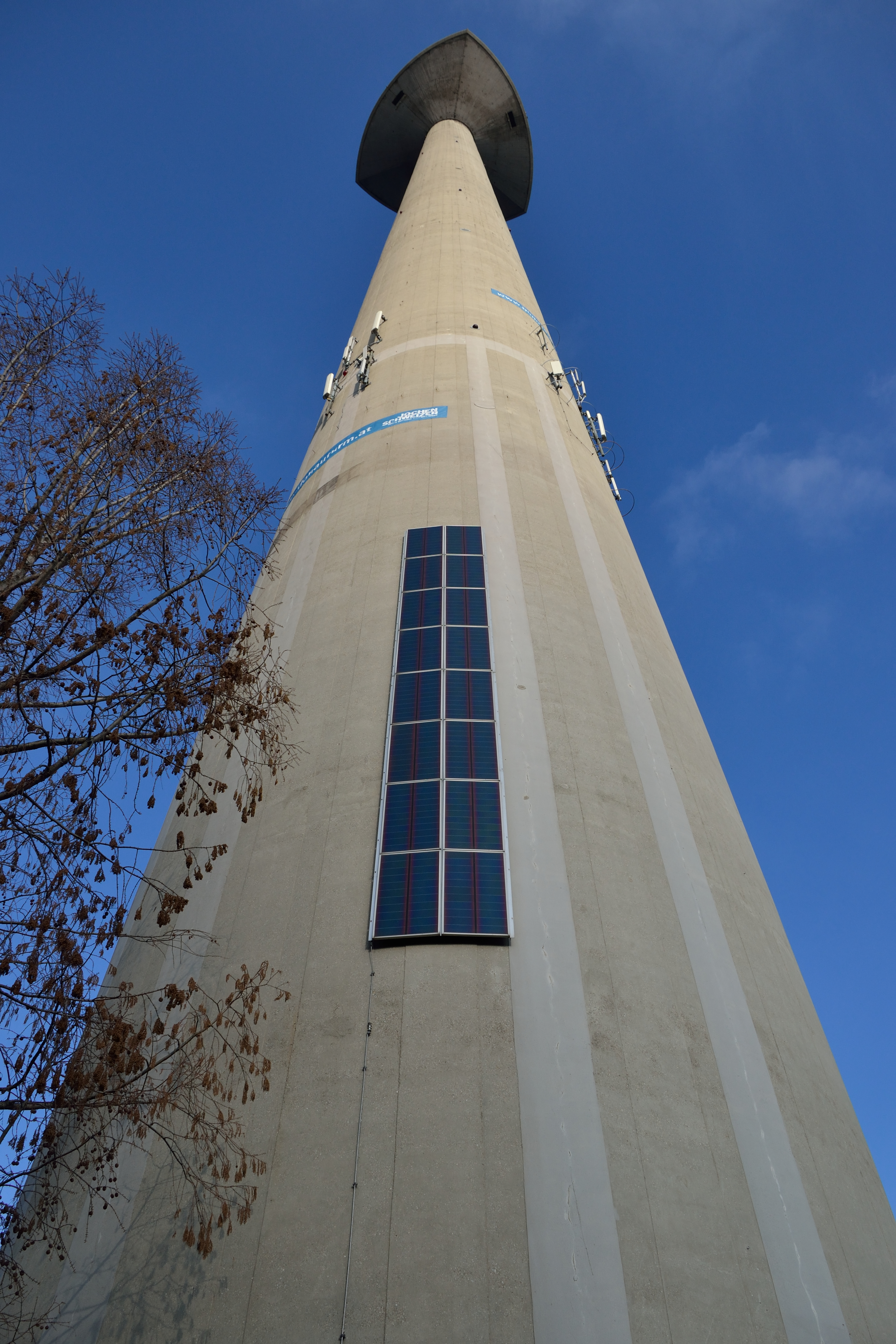 Donauturm